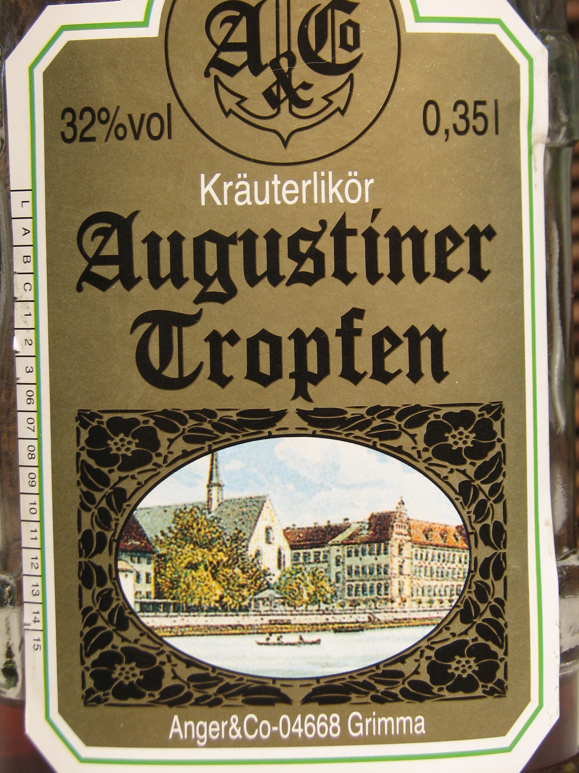 Grimmaer Augustiner Tropfen - historisch gestaltetes Etikett